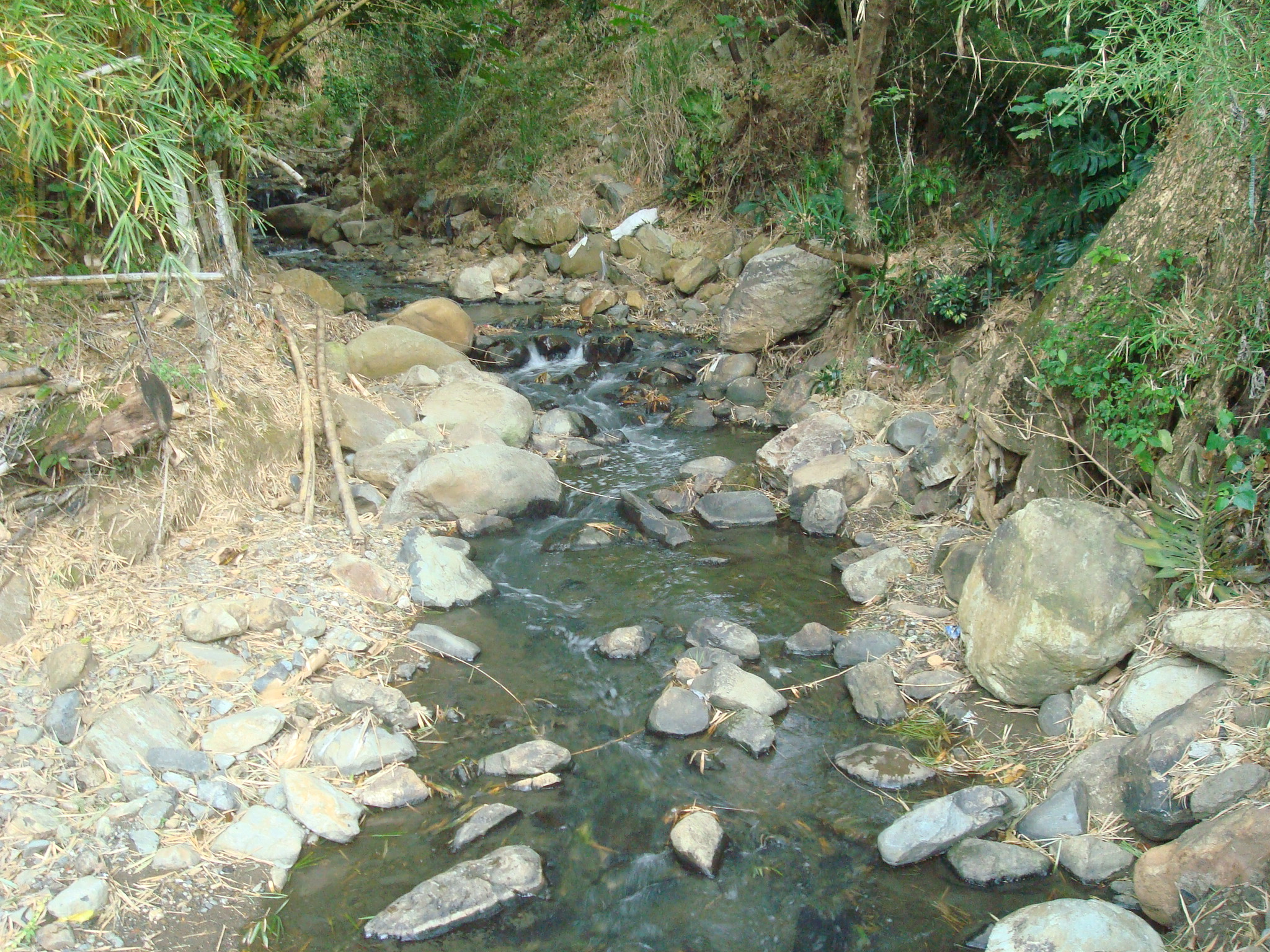 Río Agres, en Escazú, Costa Rica.